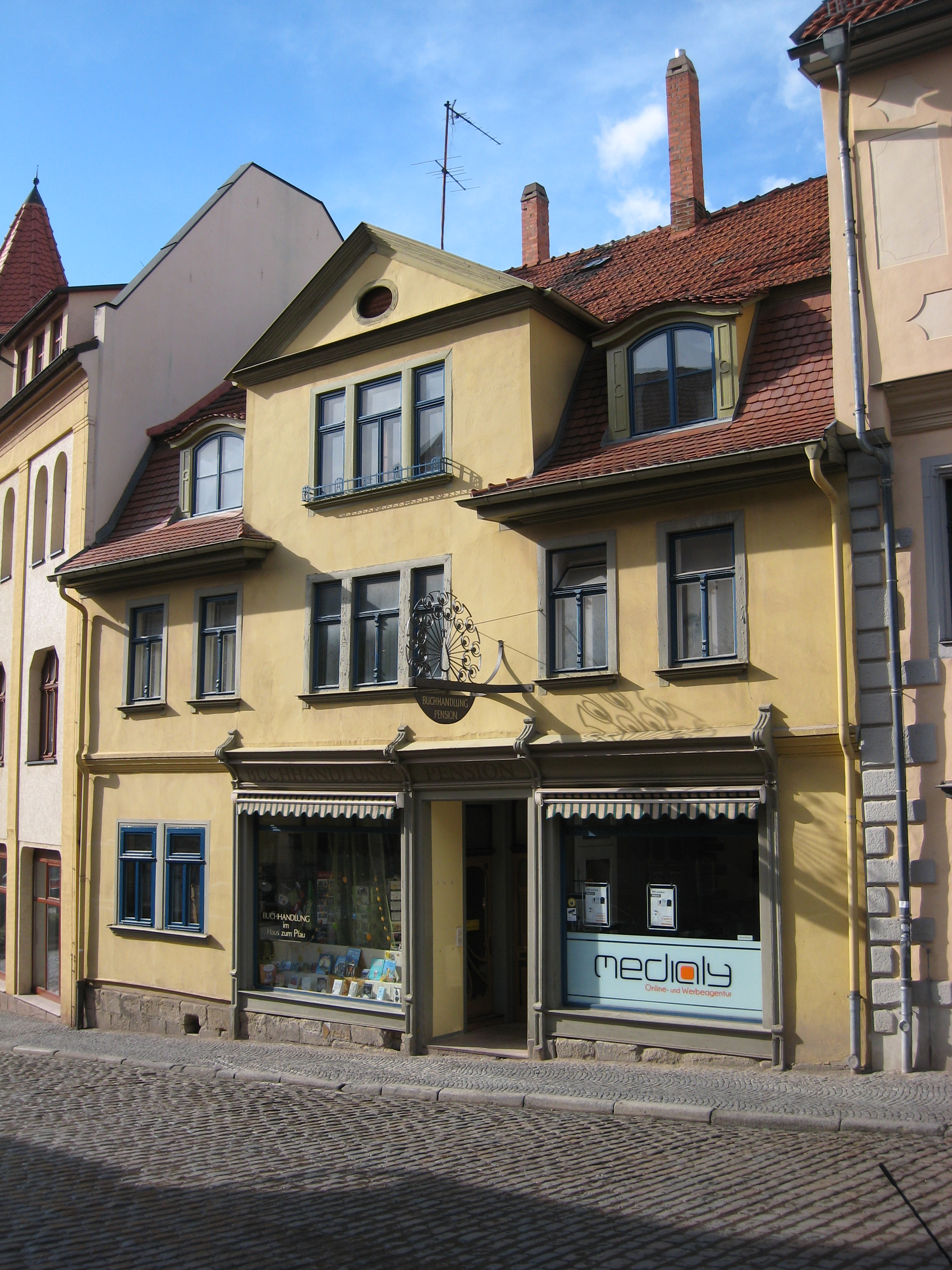 Das Haus Zum Pfau in Arnstadt, Unterm Markt 3, mit Buchhandlung.